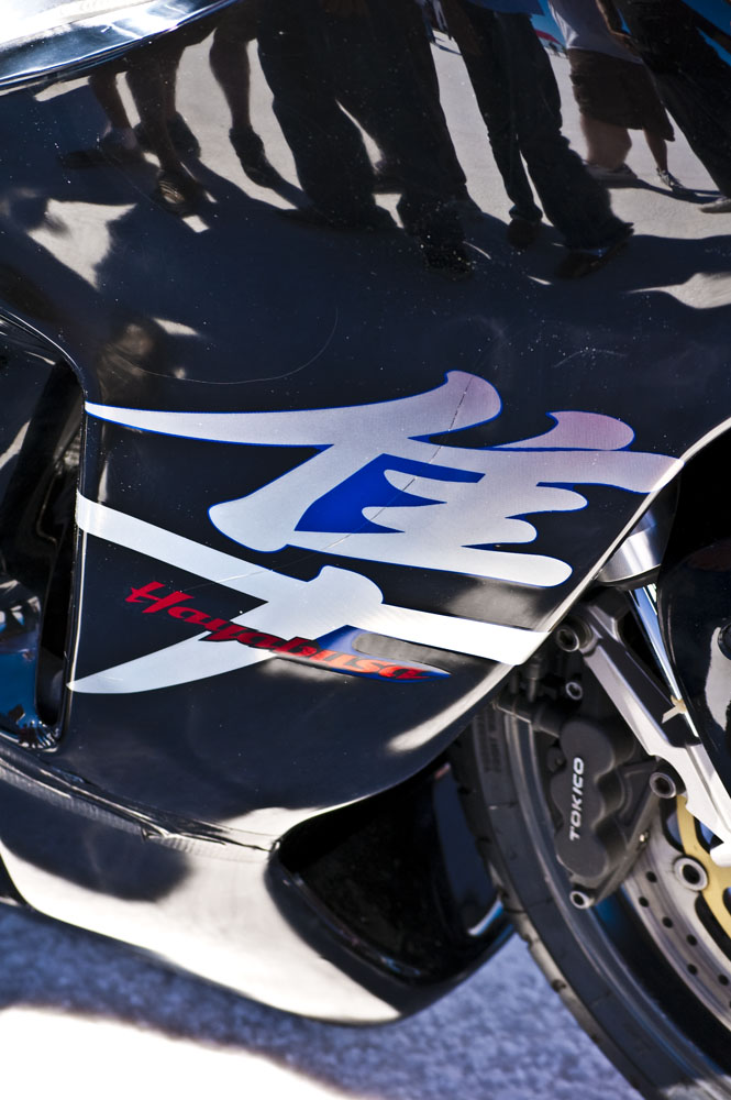 Hayabusa Closeup at Bonneville salt flats, 2009.